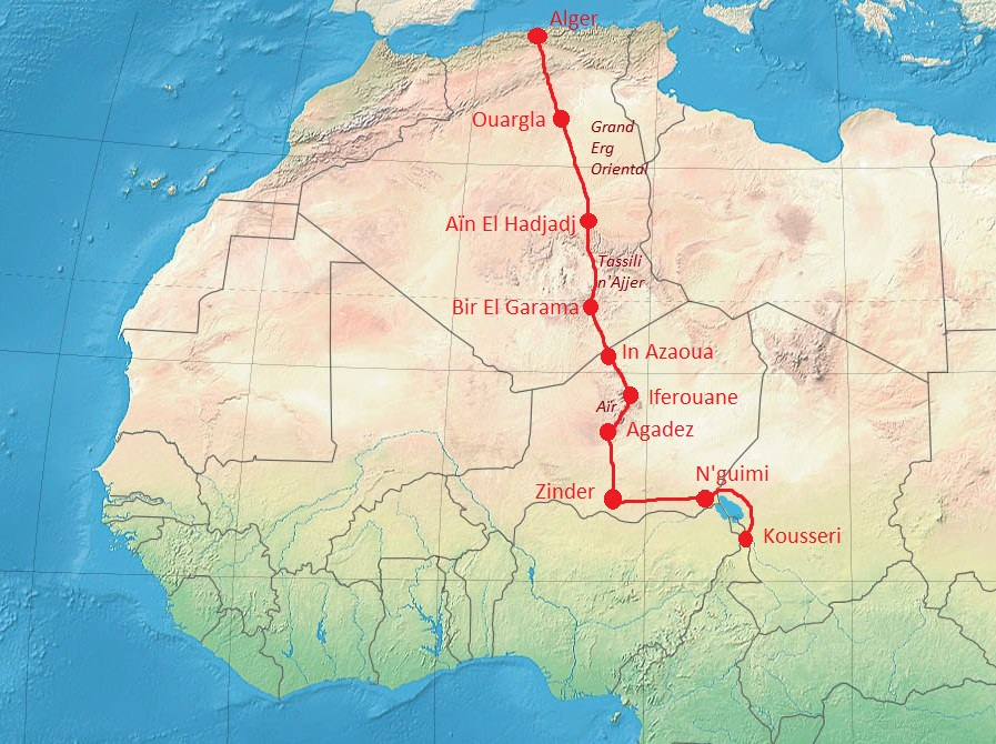 Itinéraire de la mission Foureau-Lamy entre 1898 et 1900